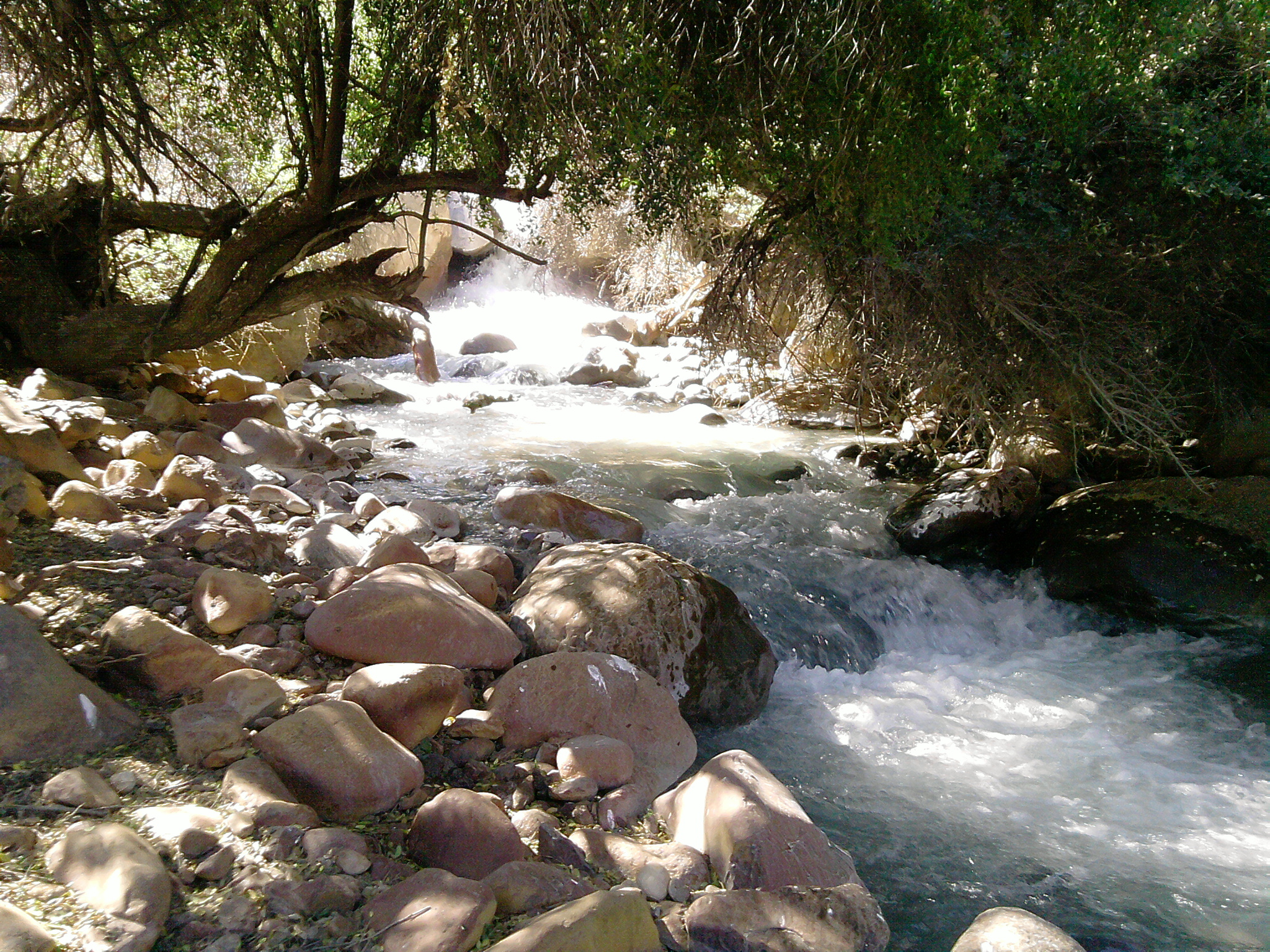 Estero Yerba loca, en parque nacional del mismo nombre, Chile